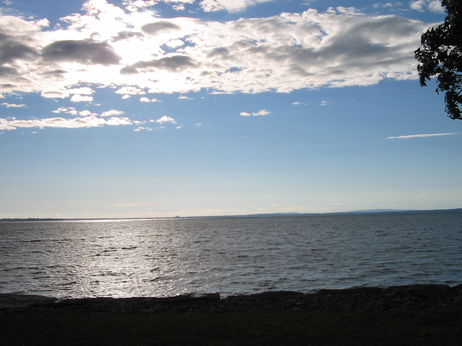 Photo du Lac St-Louis sur la rive de ville de Léry